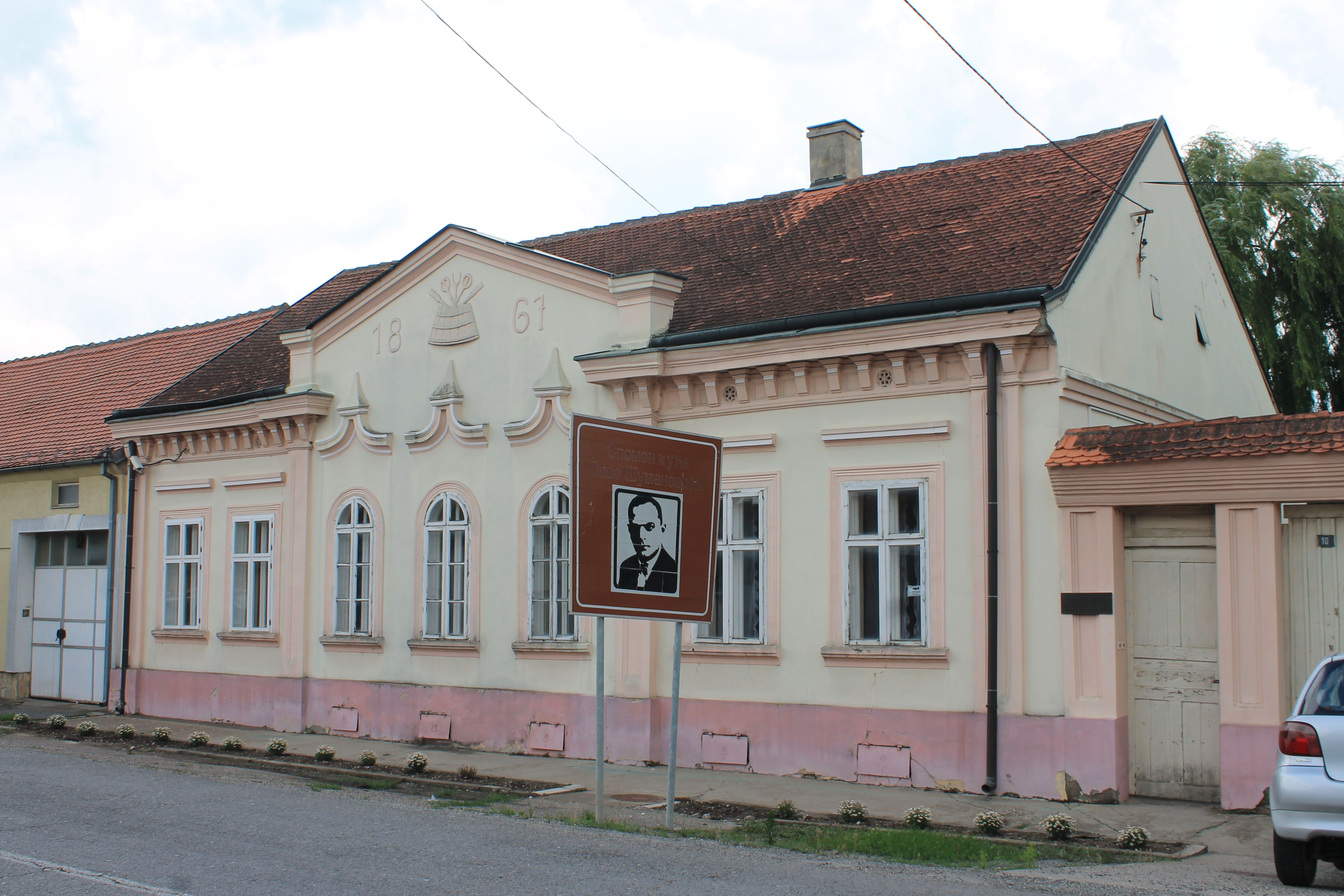 Kuća Save Šumanovića